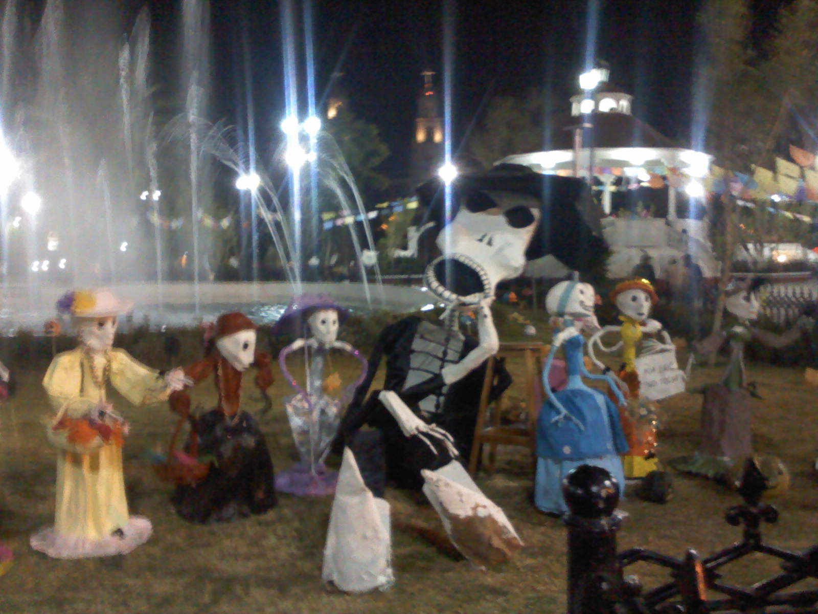 Exposicion de catrinas en el jardin Bicentenario